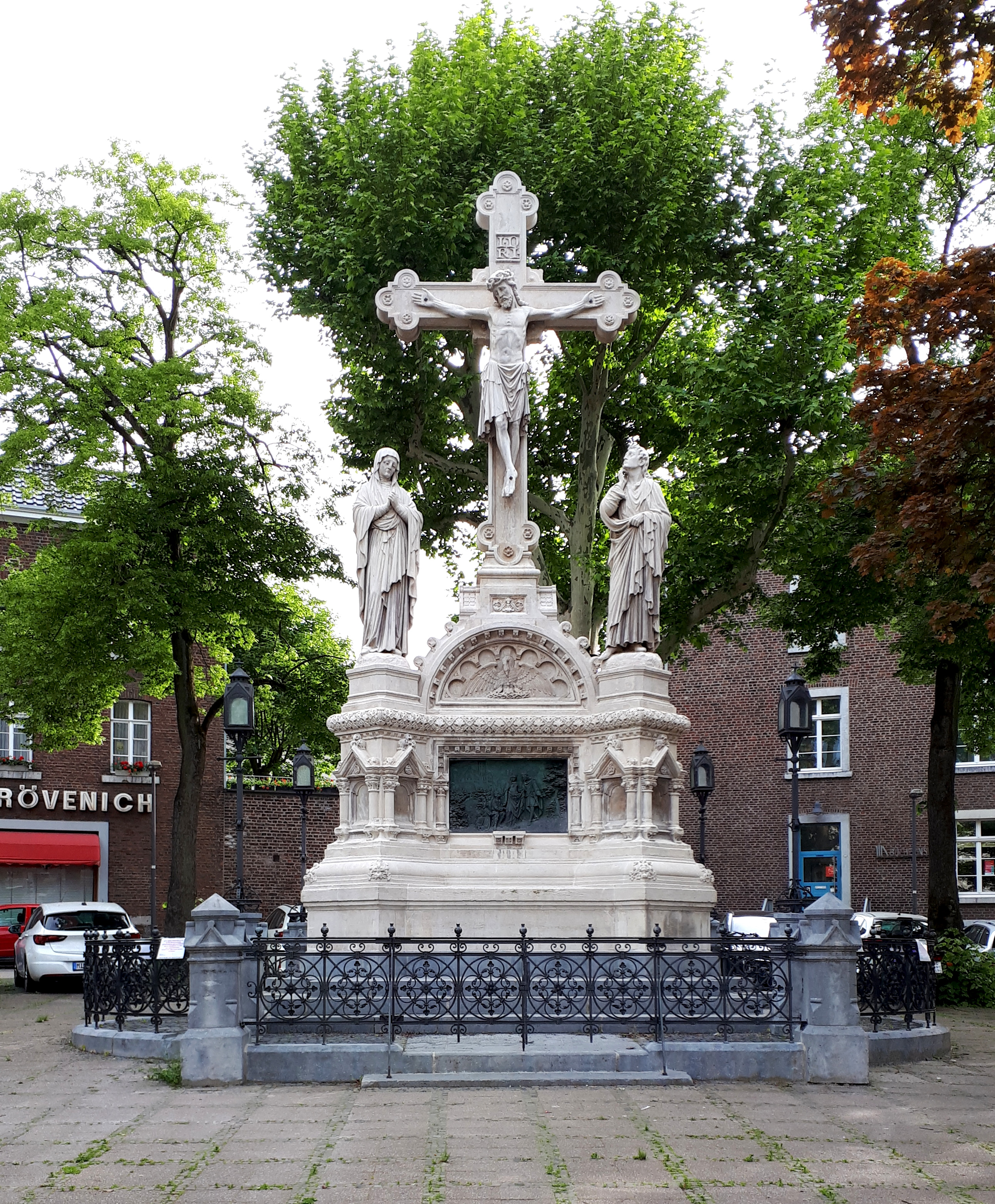 Kreuzigungsgruppe Kalvarienberg an St. Jakob in Aachen nach der Restaurierung